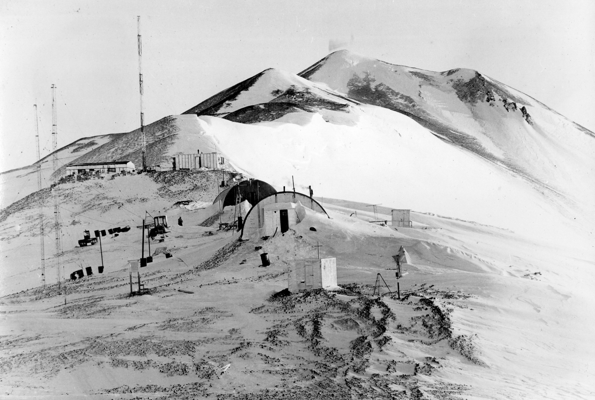 Base Conjunta Teniente Matienzo año 1962